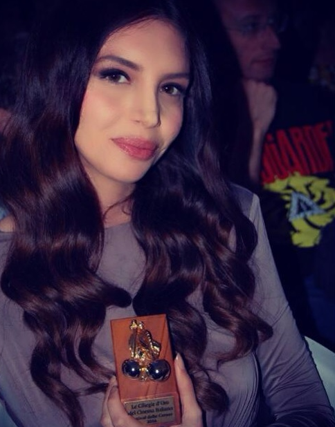 Ilenia Pastorelli Festival Cerase 2016 - Formato corretto